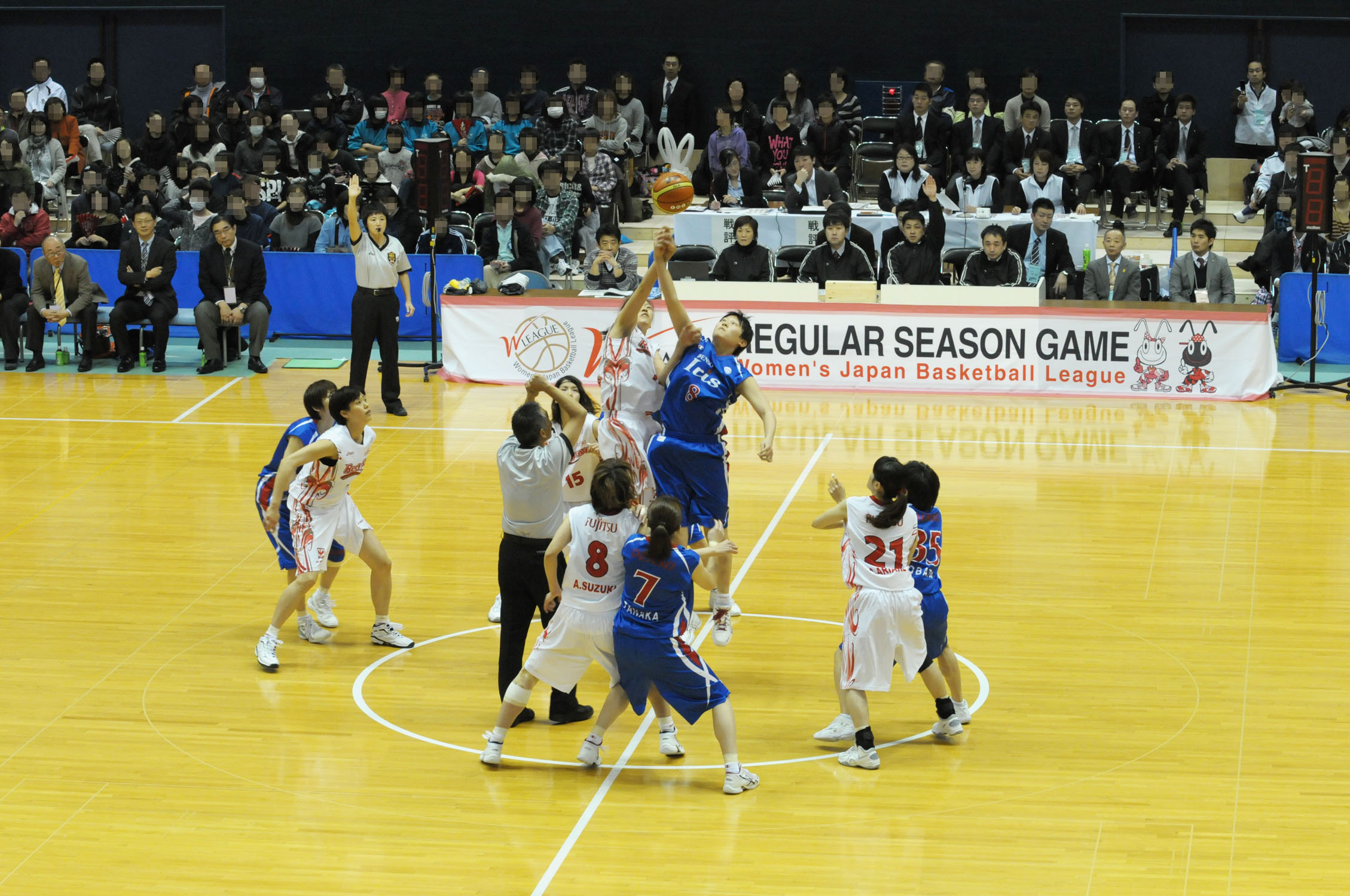 WJBL 11-12レギュラーリーグ WI、富士通対デンソー。美郷総合体育館で。